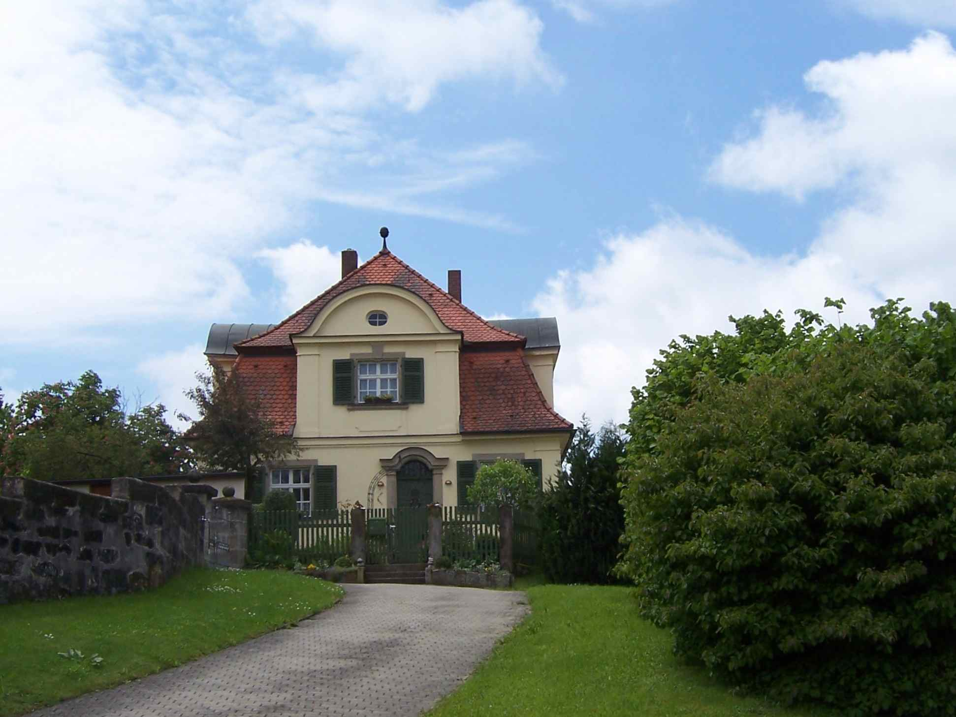 Aberzhausen_Pfarrhau